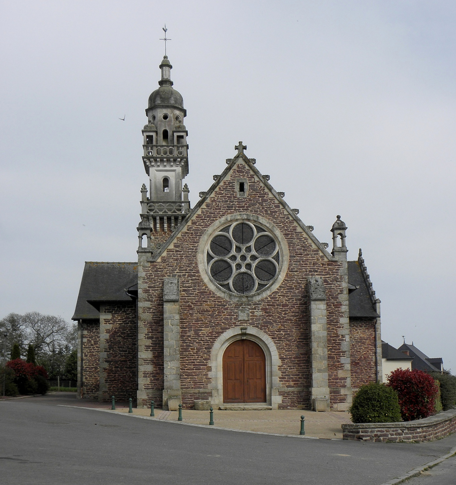 Église Saint-Lunaire de Loscouët-sur-Meu (22). Façade occidentale.